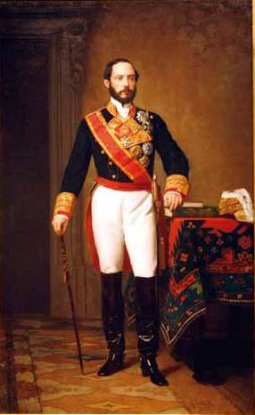 Retrato del general Juan Prim y Prats (1814-1870), que llegó a ser Presidente del Consejo de Ministros de España, conde de Reus, marqués de los Castillejos y vizconde del Bruch. Fue asesinado en Madrid en 1870.